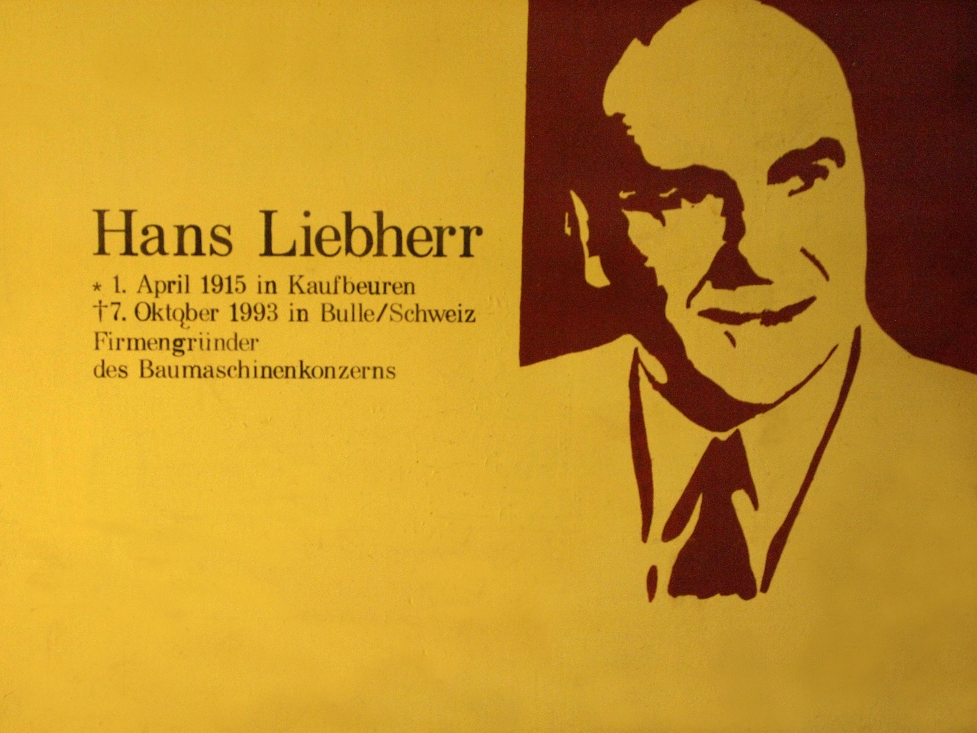 Bild von Hans Liebherr in der Fußgängerunterführung des Bahnhof Kaufbeuren